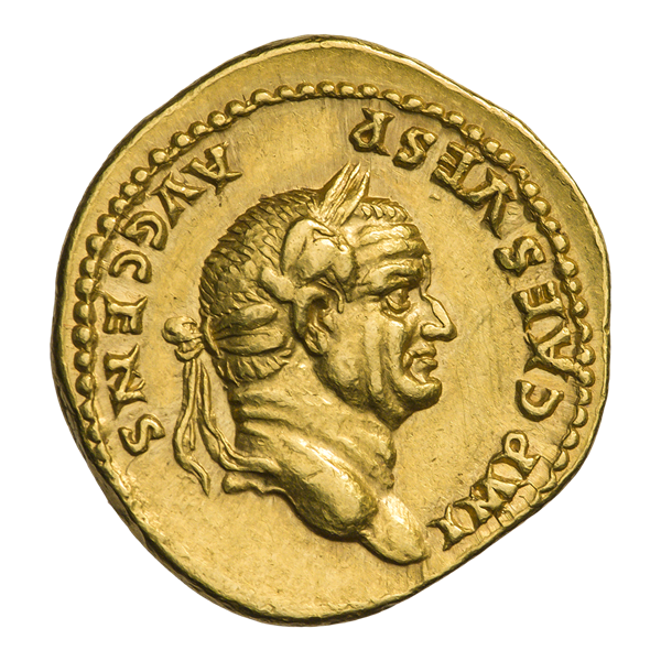 Веспасиан (69—79). Ауреус. Ок. 73 г. Рим. Аверс. Надпись IMP CAES VESP AVG CENS. Голова Веспасиана в лавровом венке, вправо.